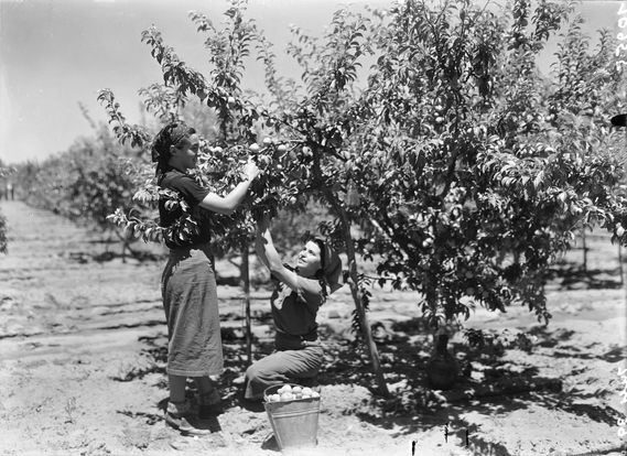 קטיף במקווה ישראל